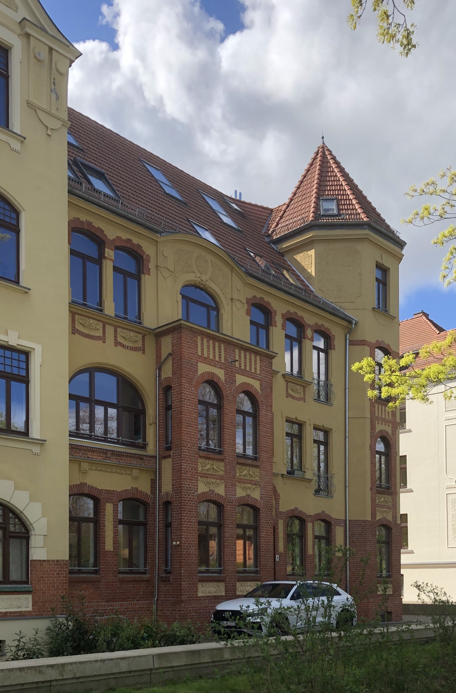 Benediktinerstraße 4